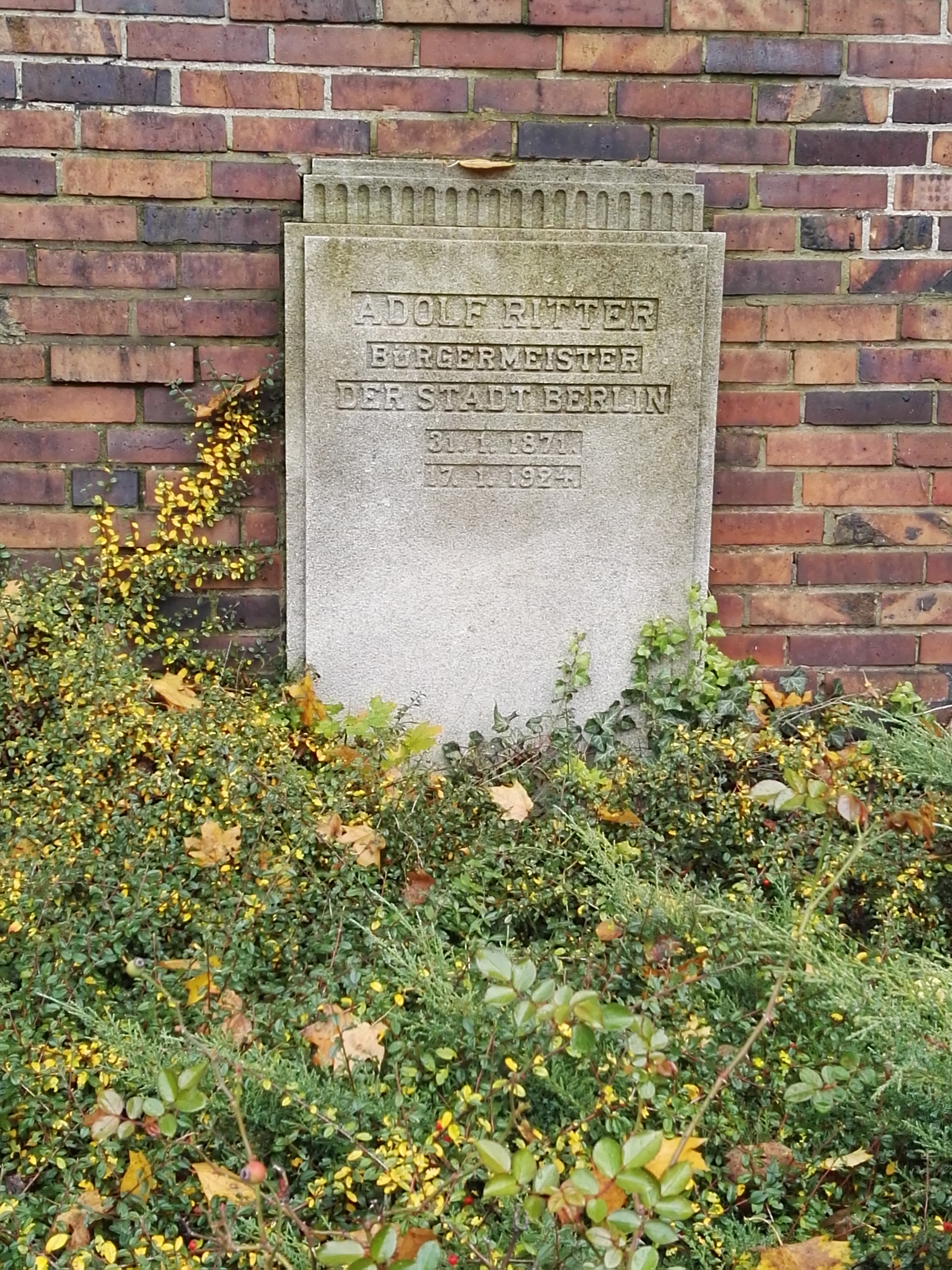 Grab von Adolf Ritter (1871–1924), deutscher Schneider, Verbandsfunktionär und Politiker (SPD) in der Gedenkstätte der Sozialisten auf dem Zentralfriedhof Friedrichsfelde in Berlin-Lichtenberg